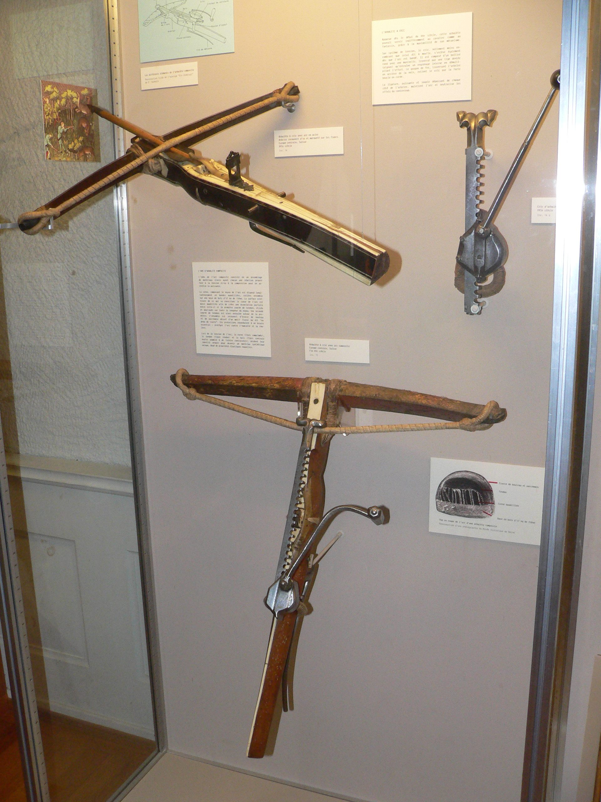 arbalètes, musée du chateau de Morges, Suisse.